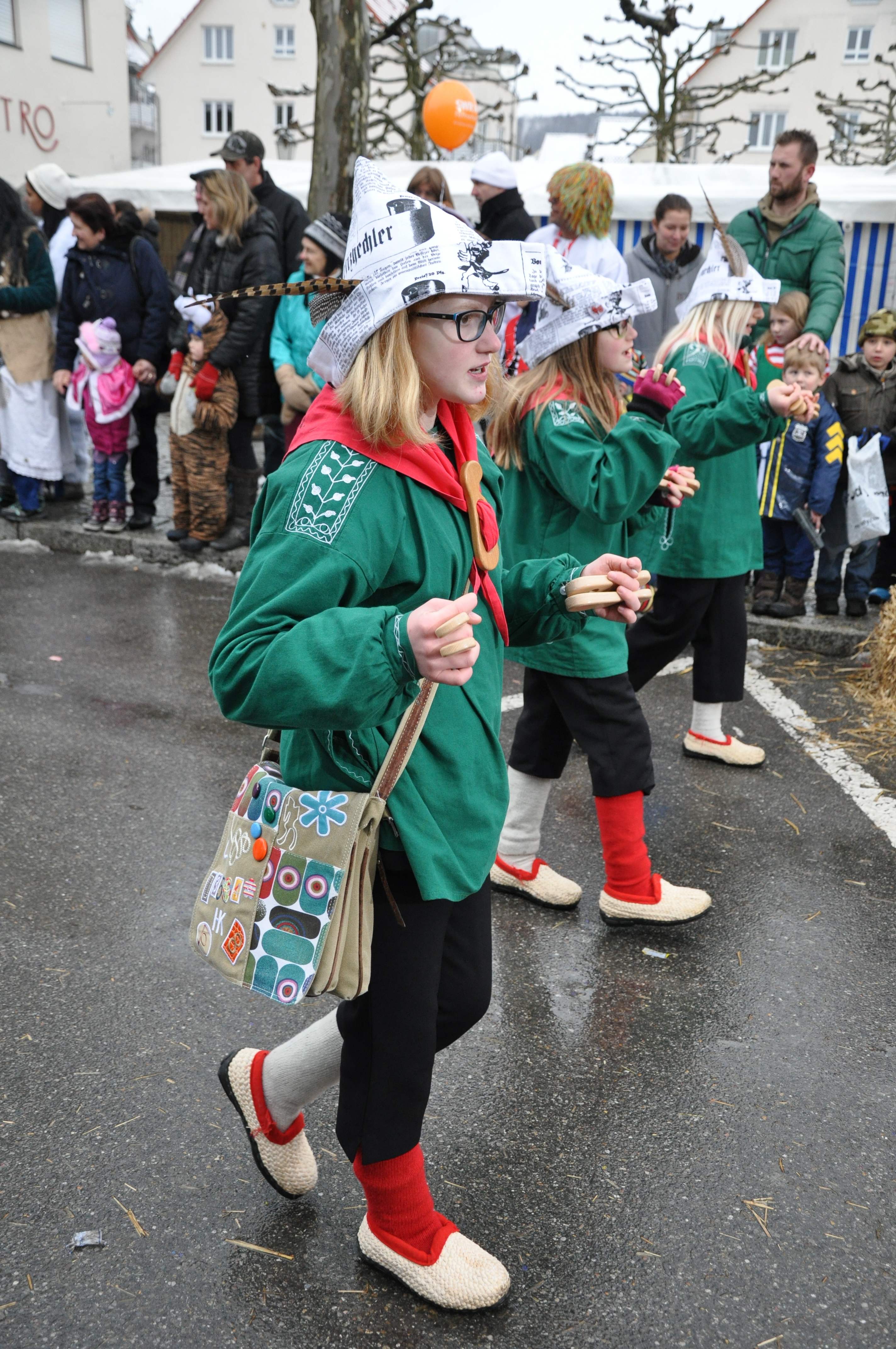 Narrenzunft Haslach im Kingzigtal, Klepperlesgarde Fotografiert beim Landschaftstreffen der Vereinigung Schwäbisch-Alemannischer Narrenzünfte (VSAN) 2015 in Weingarten; Narrensprung am Sonntag, 25. Januar 2015